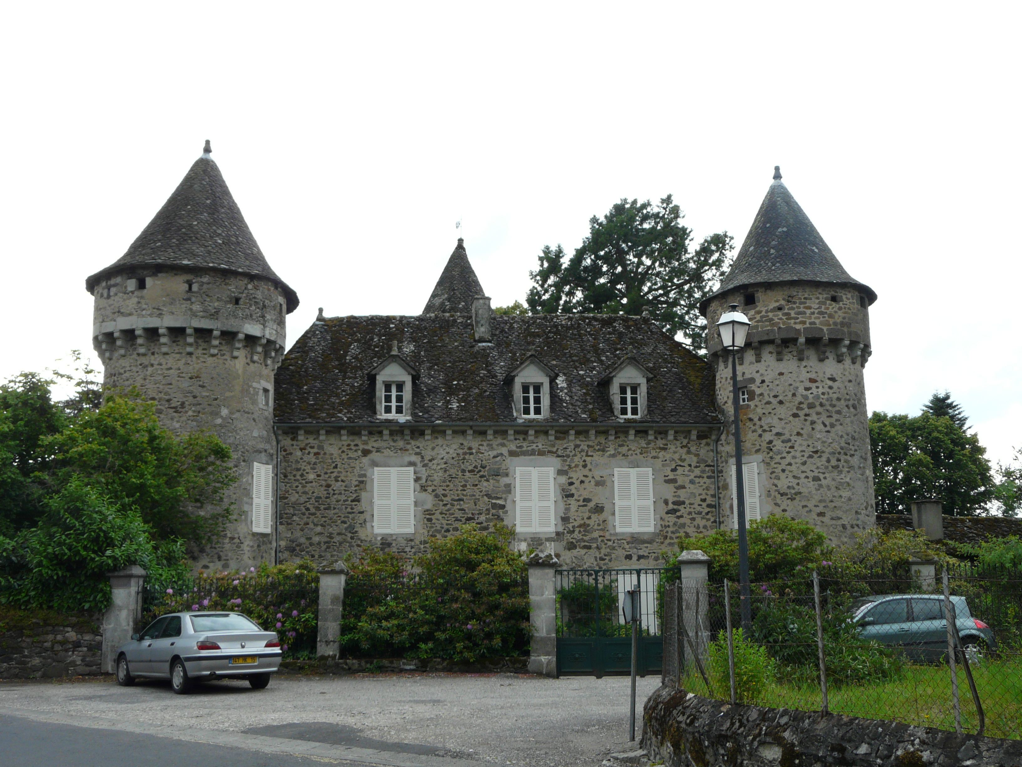 Le château de Saint-Étienne, Saint-Étienne-de-Chomeil, Cantal, France.